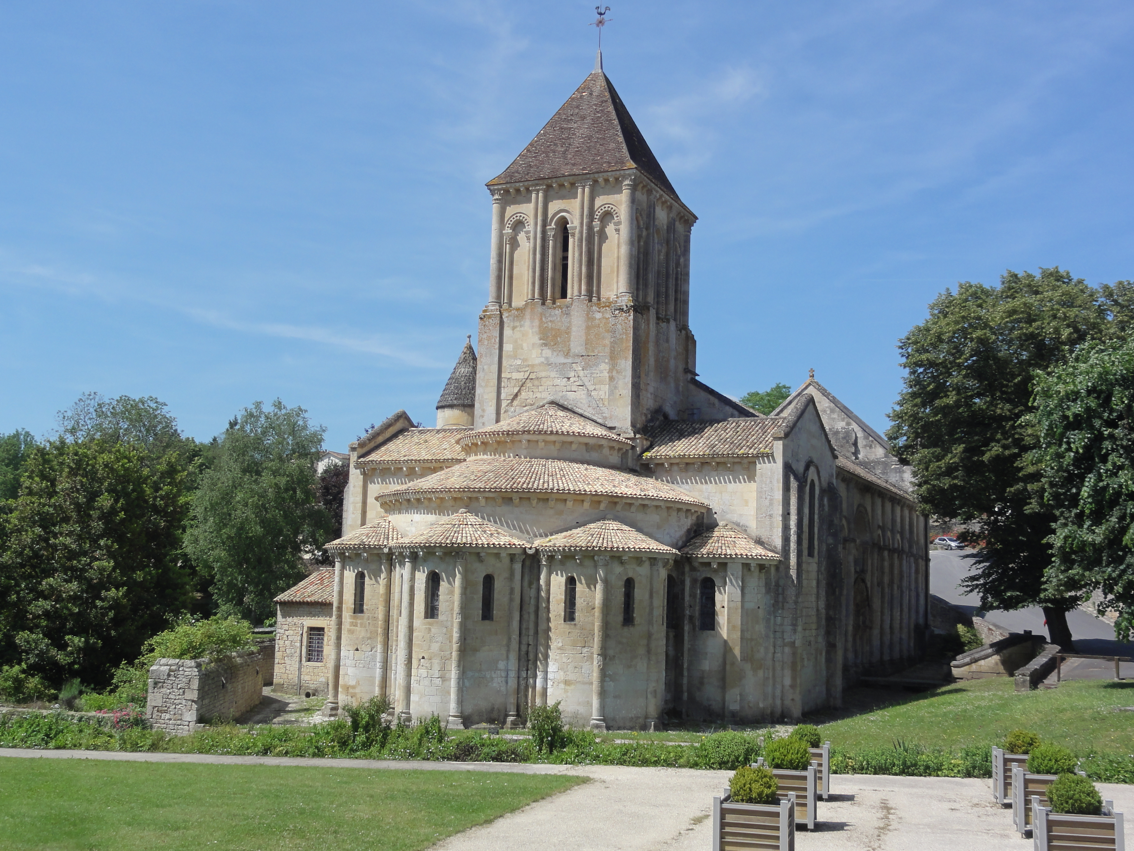 Église Saint-Hilaire de Melle, chevet .